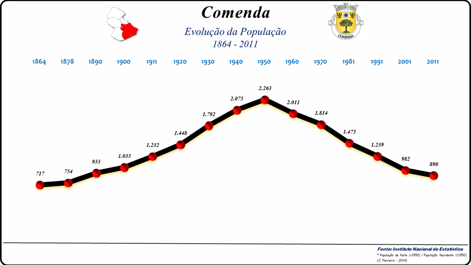 Evolução da População